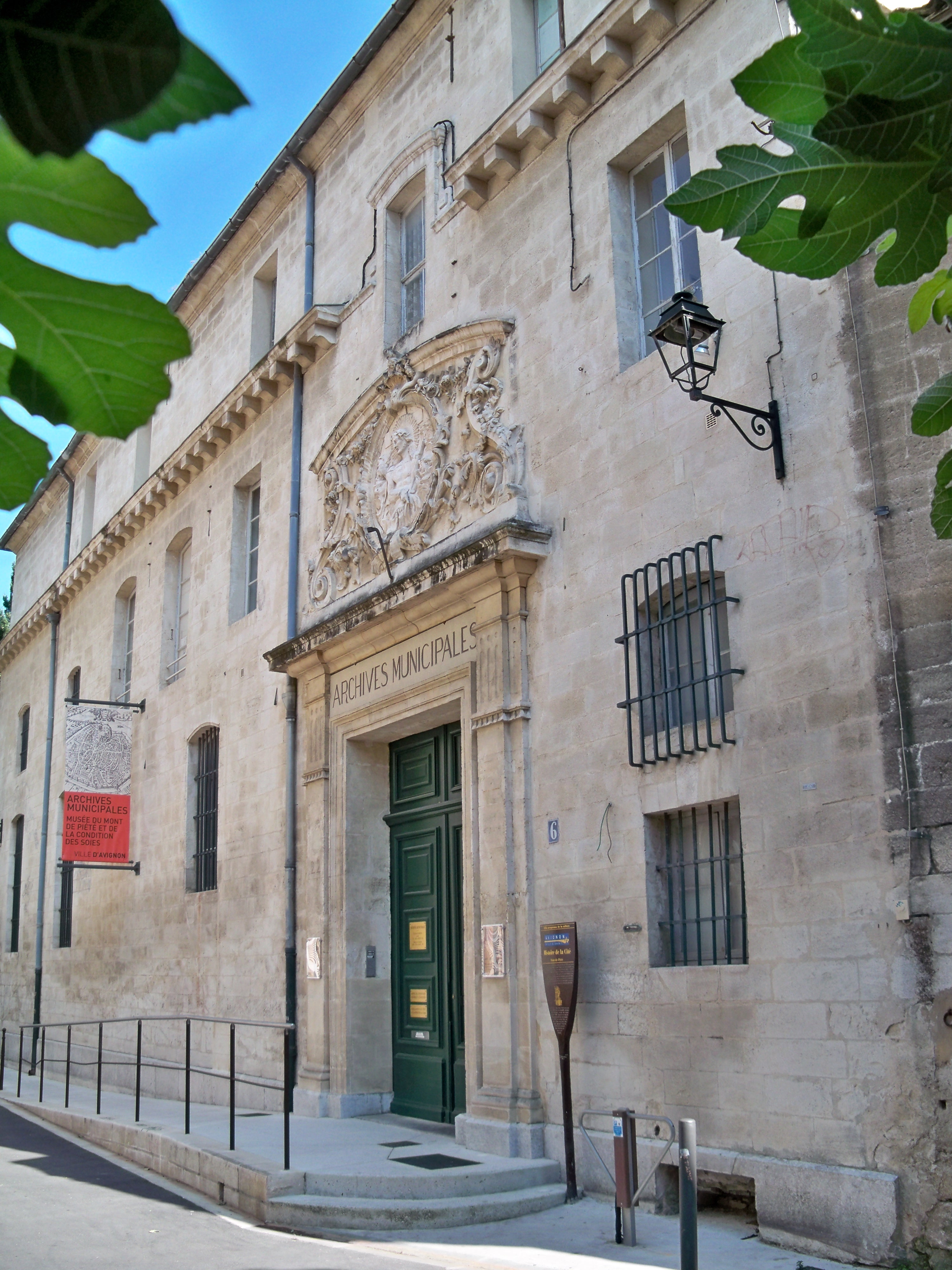 Archives municipales d'Avignon, Vaucluse